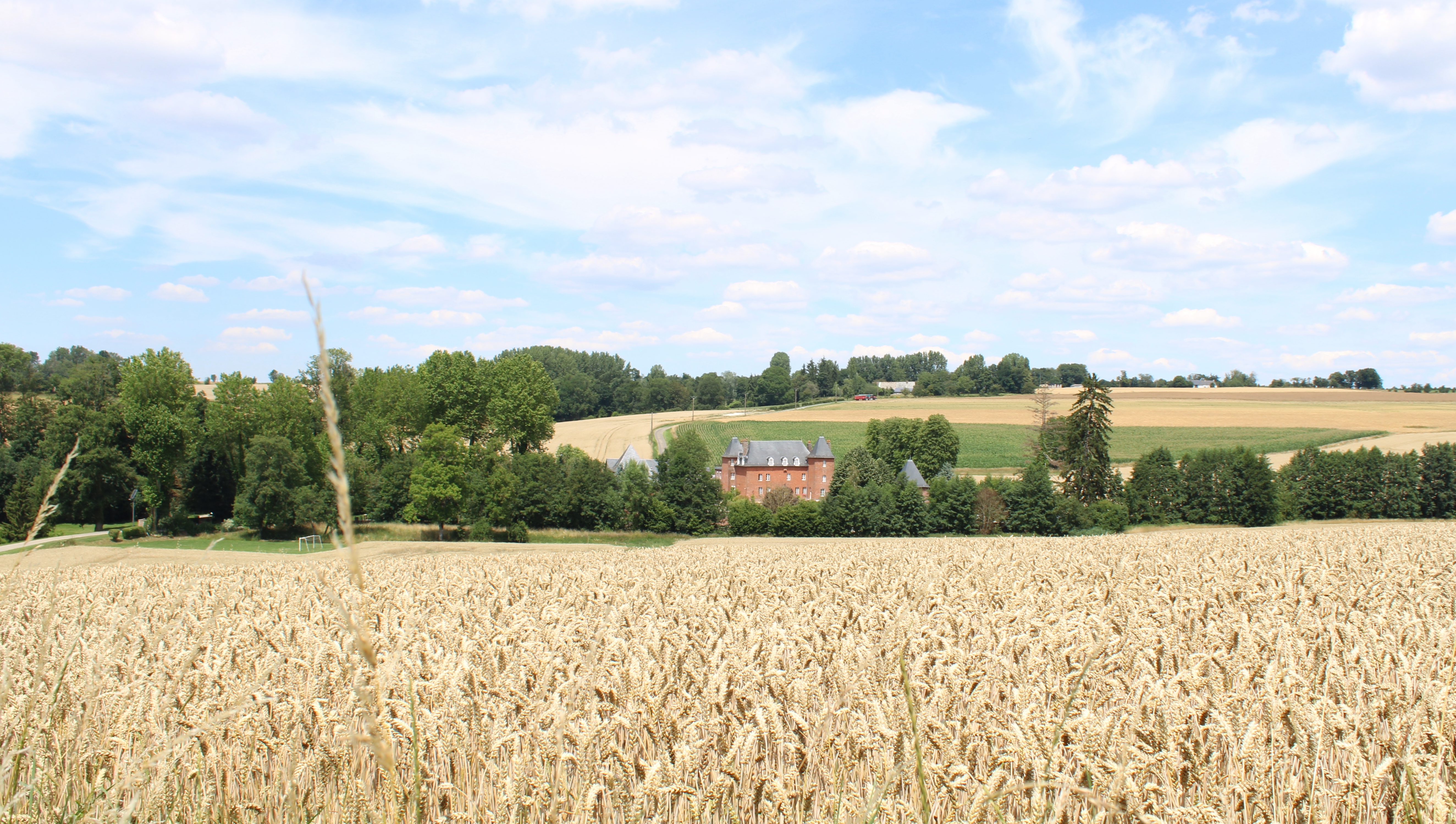 Vue du château